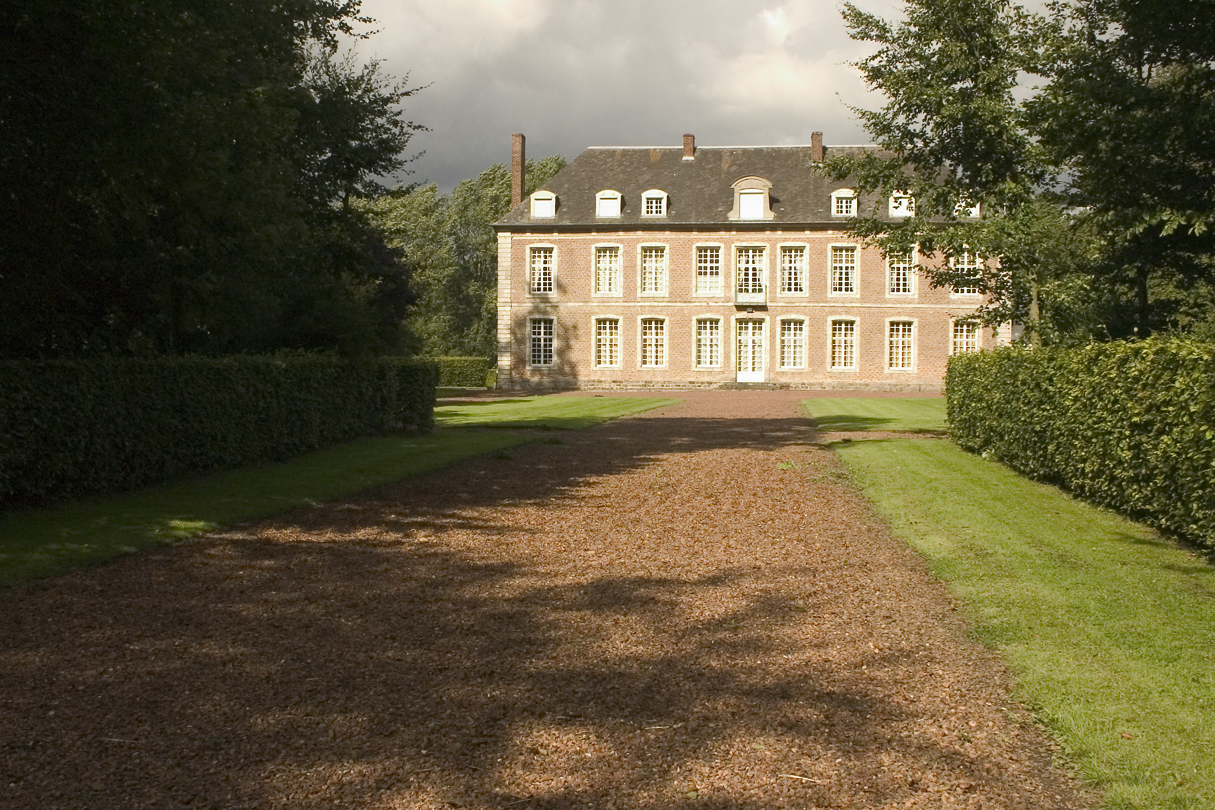 La façade avant du château de LIGNEREUIL